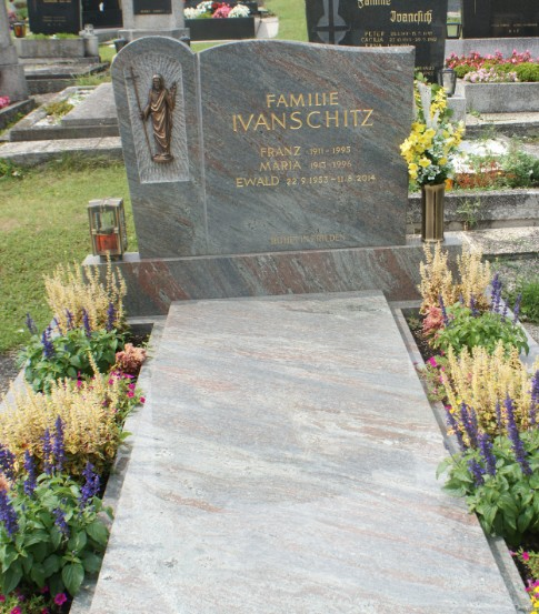 Ewald Ivanschitz-Friedhof Baumgarten, Bgld.